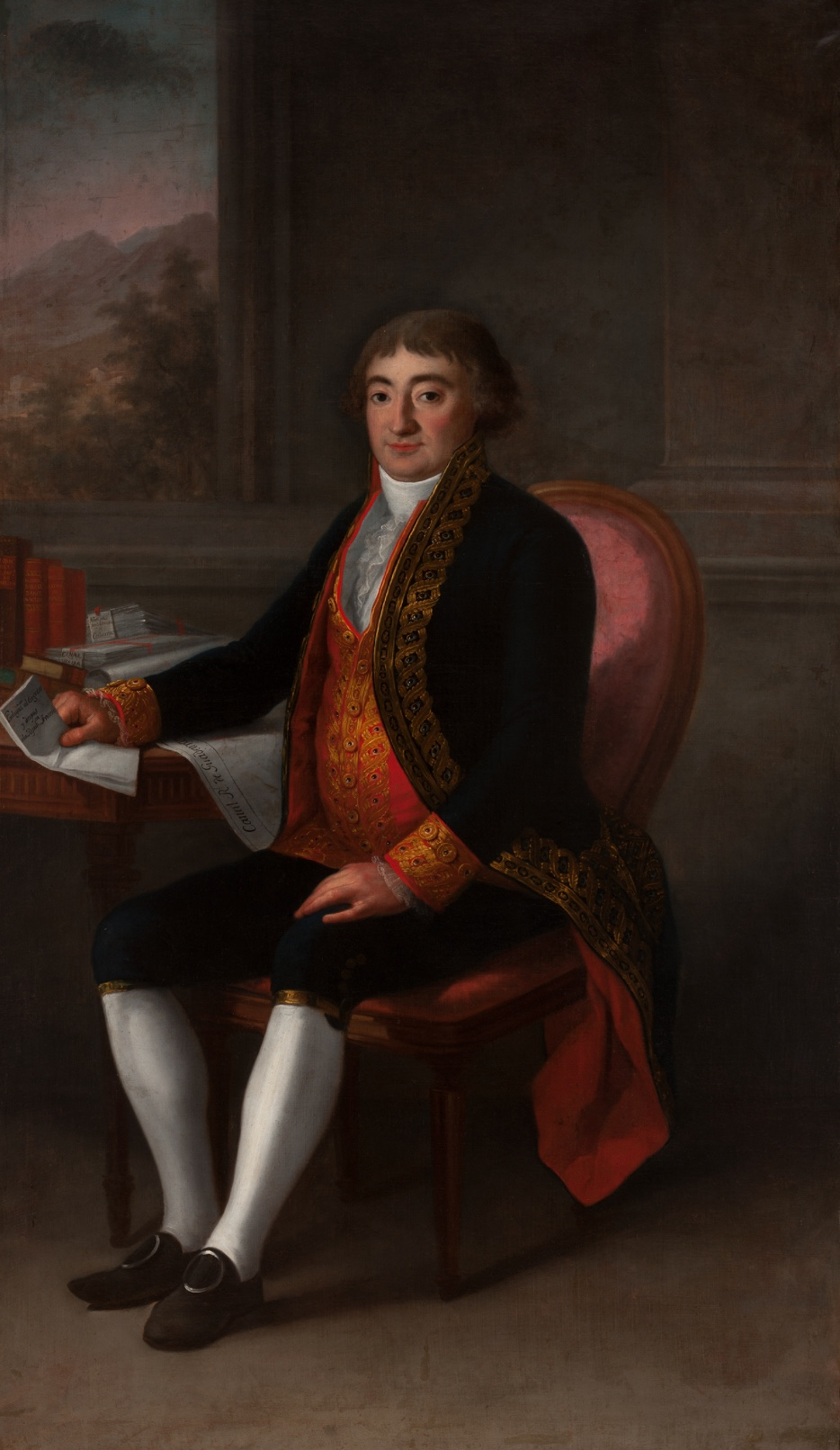 Re­tra­to del I Conde de Ca­ba­rrus